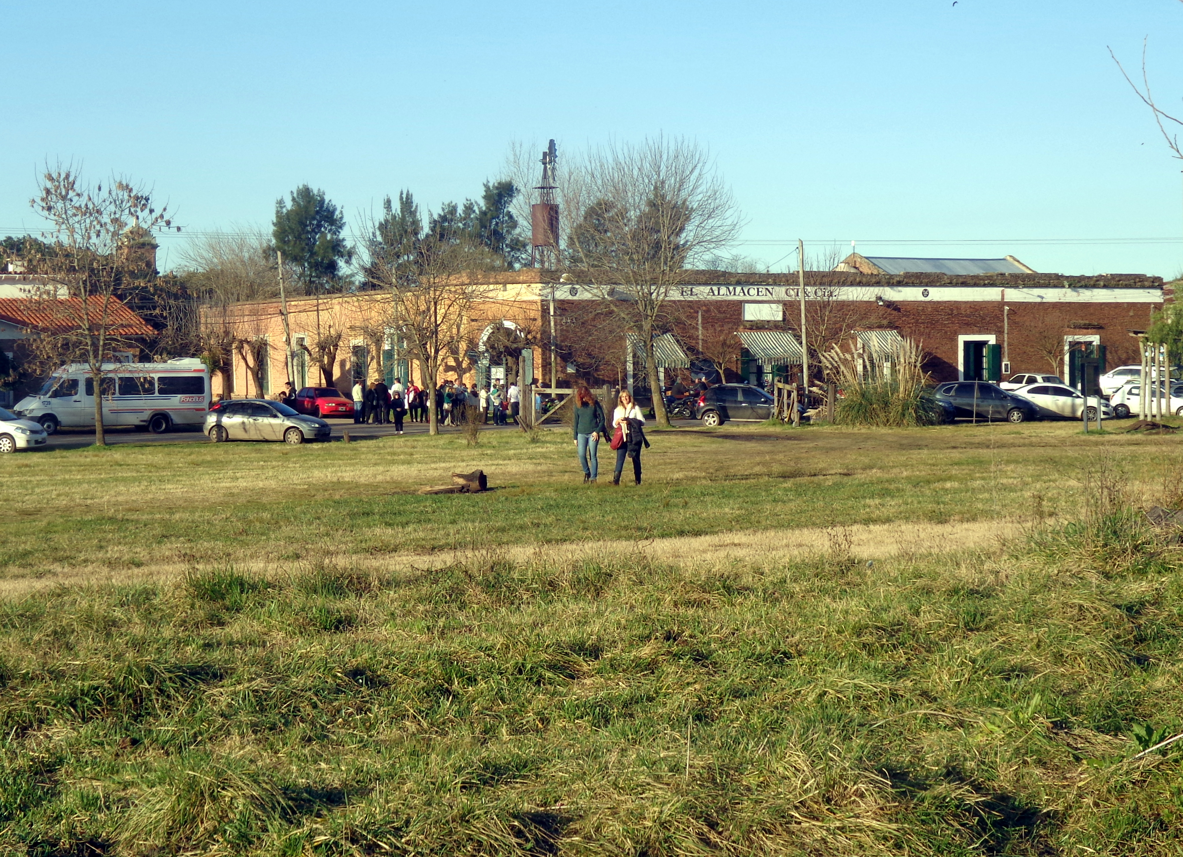 Azcuénaga, Partido de San Andrés de Giles, Provincia de Buenos Aires, Argentina.